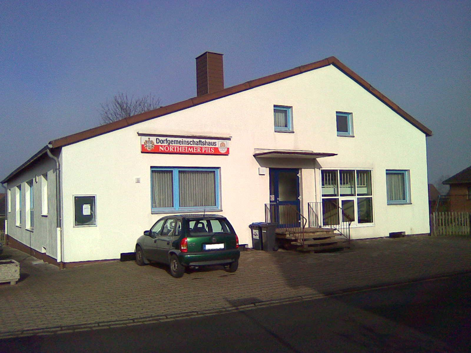 Dorfgemeinschaftshaus des Northeimer Stadtteils Schnedinghausen.